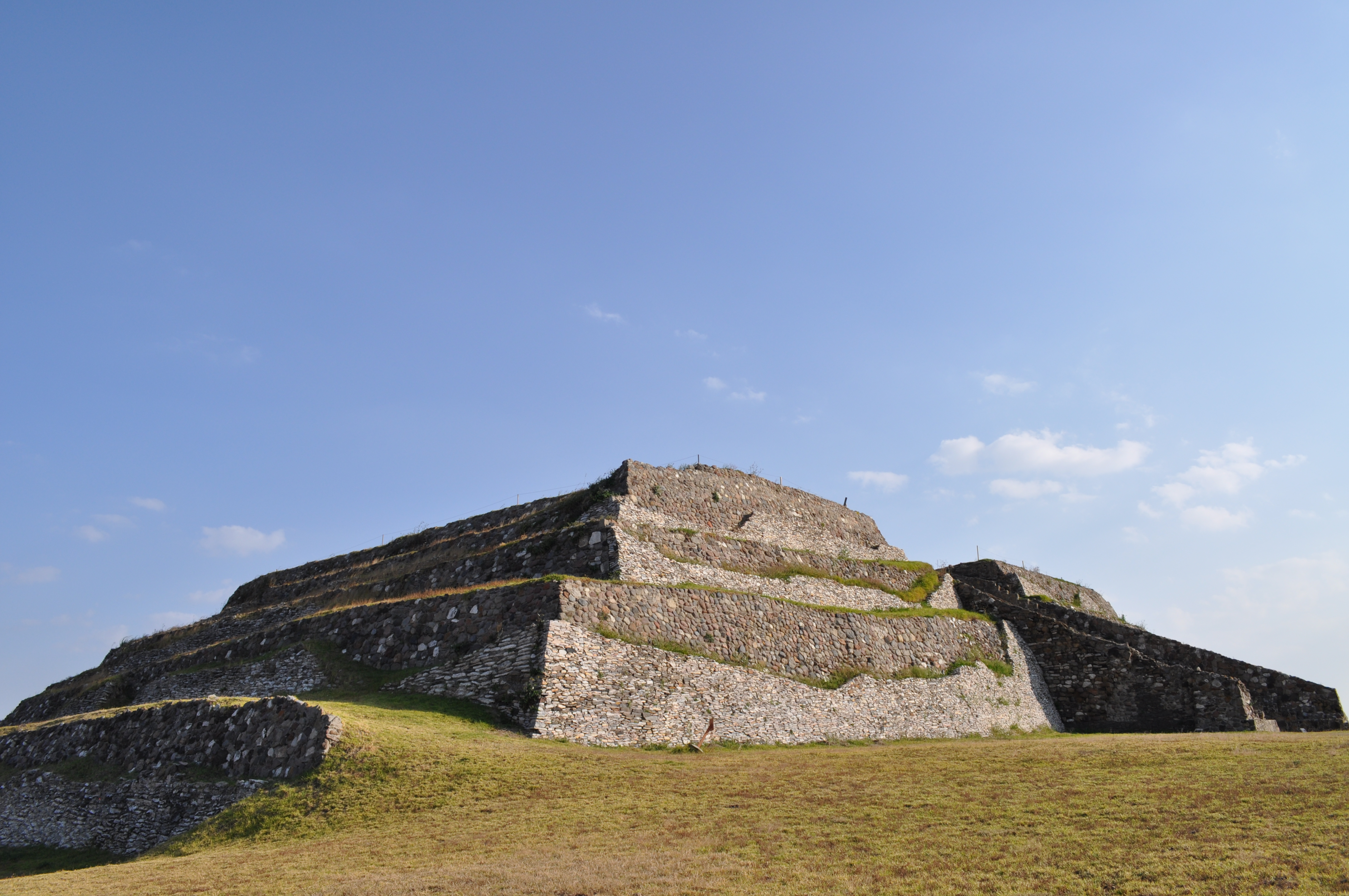 Xochitecatl